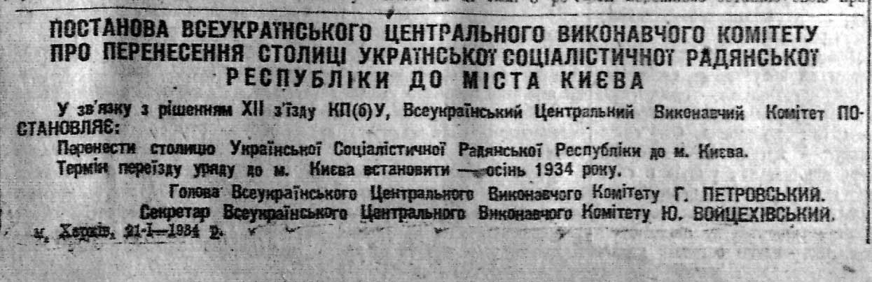 Постанова 22 січня 1934 року